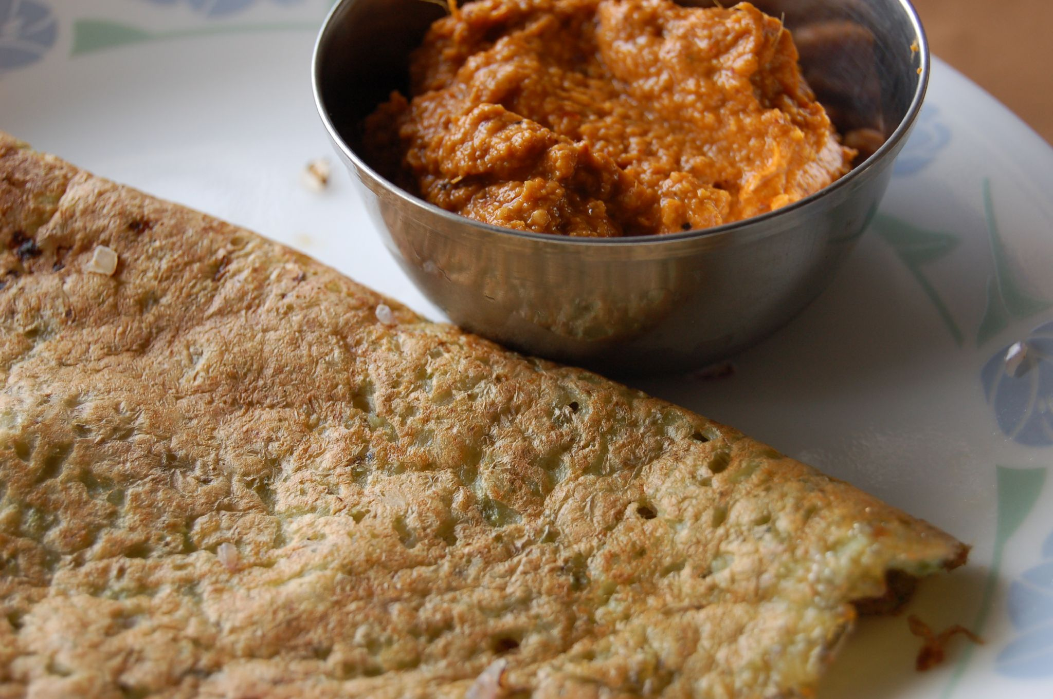 Pesarattu and Ginger chutney